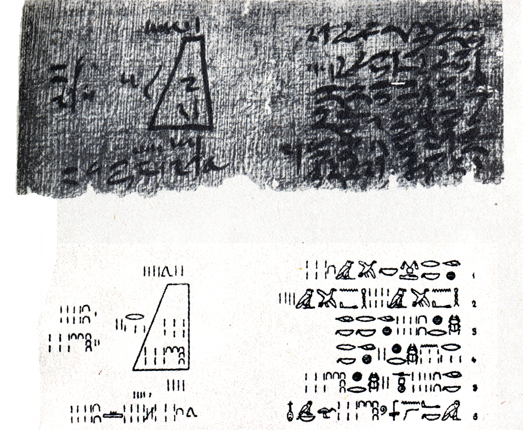 Papyrus Moskau 4676. Problem 14 - Teil.